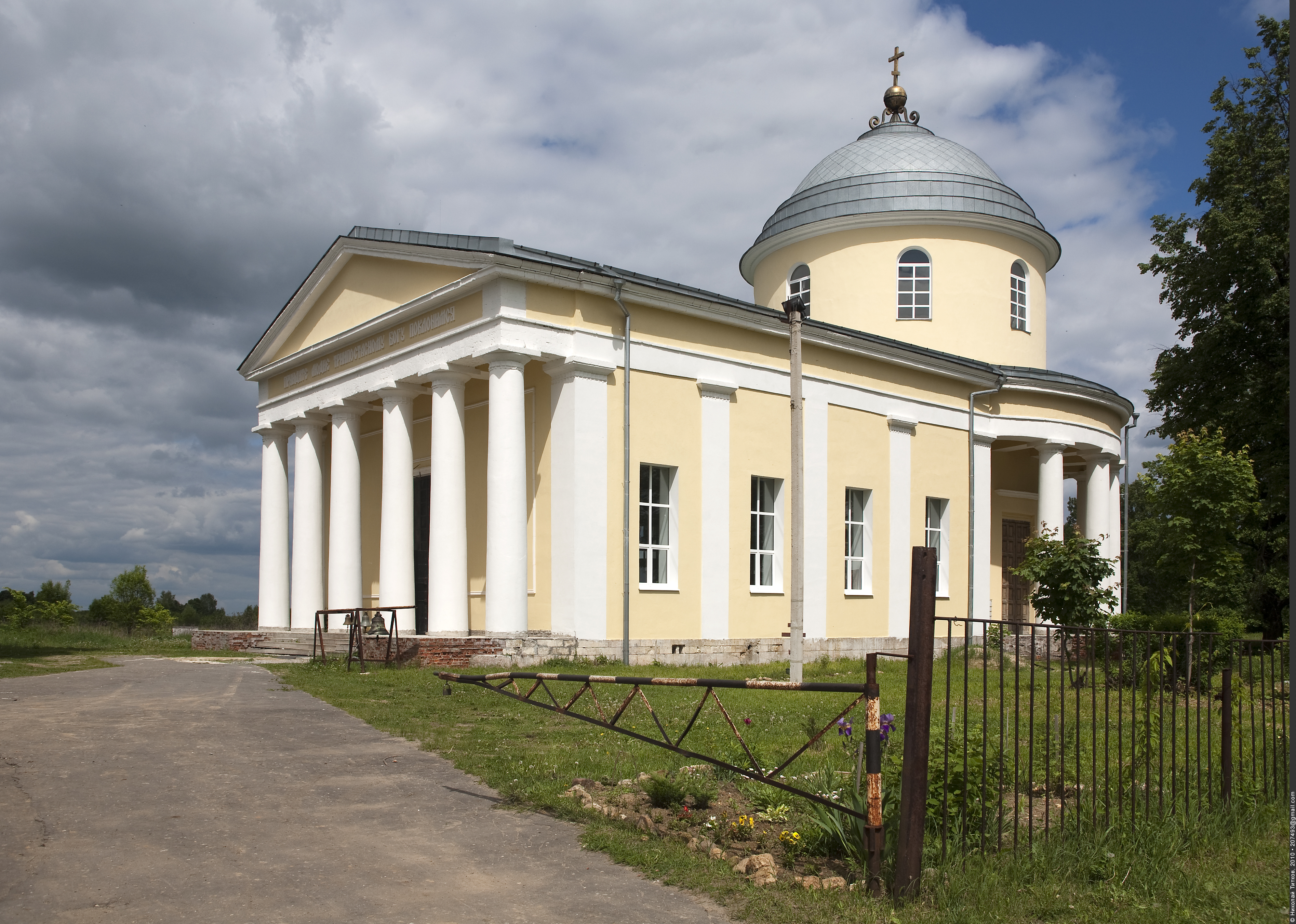 Храм Троицы Живоначальной в селе Ивашево (Храм Троицы Живоначальной в усадьбе Троицкое-Ратманово, Московская область, Ногинский район).